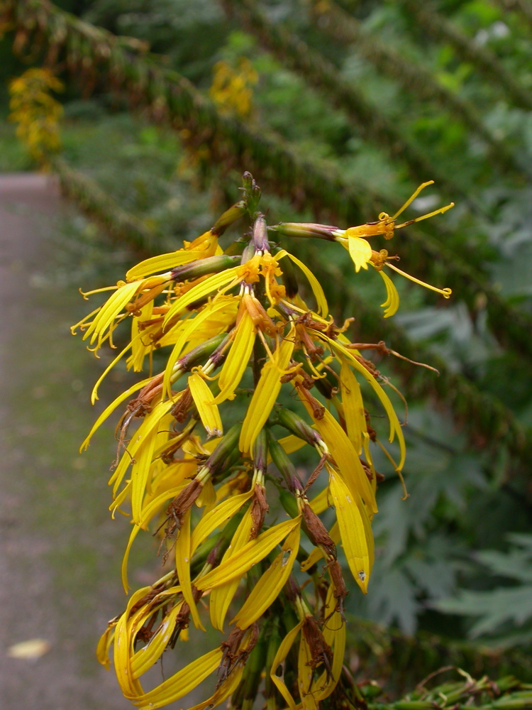 Ligularia przewalskii